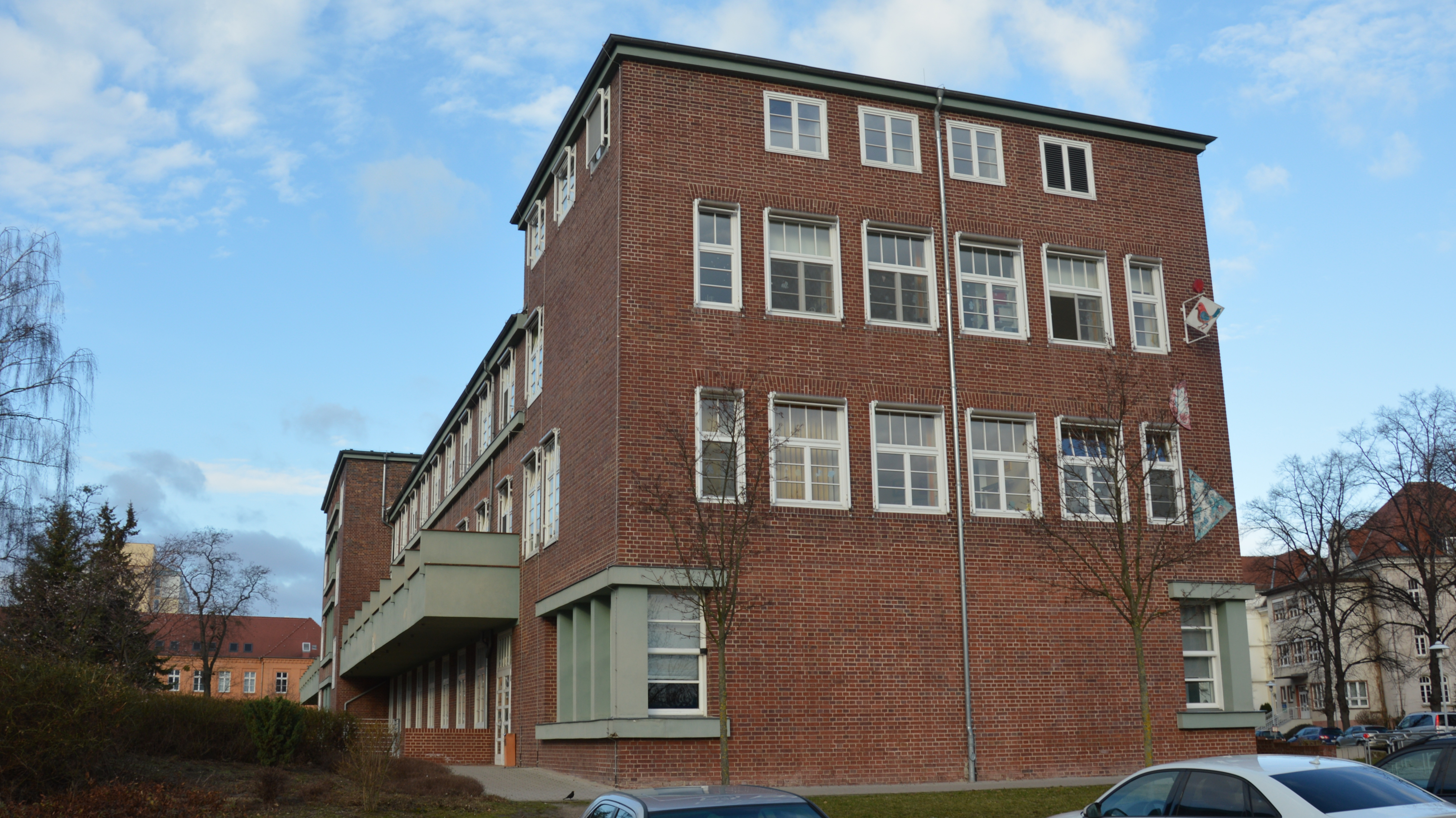 Uniklinikum Magdeburg Gebäude 10